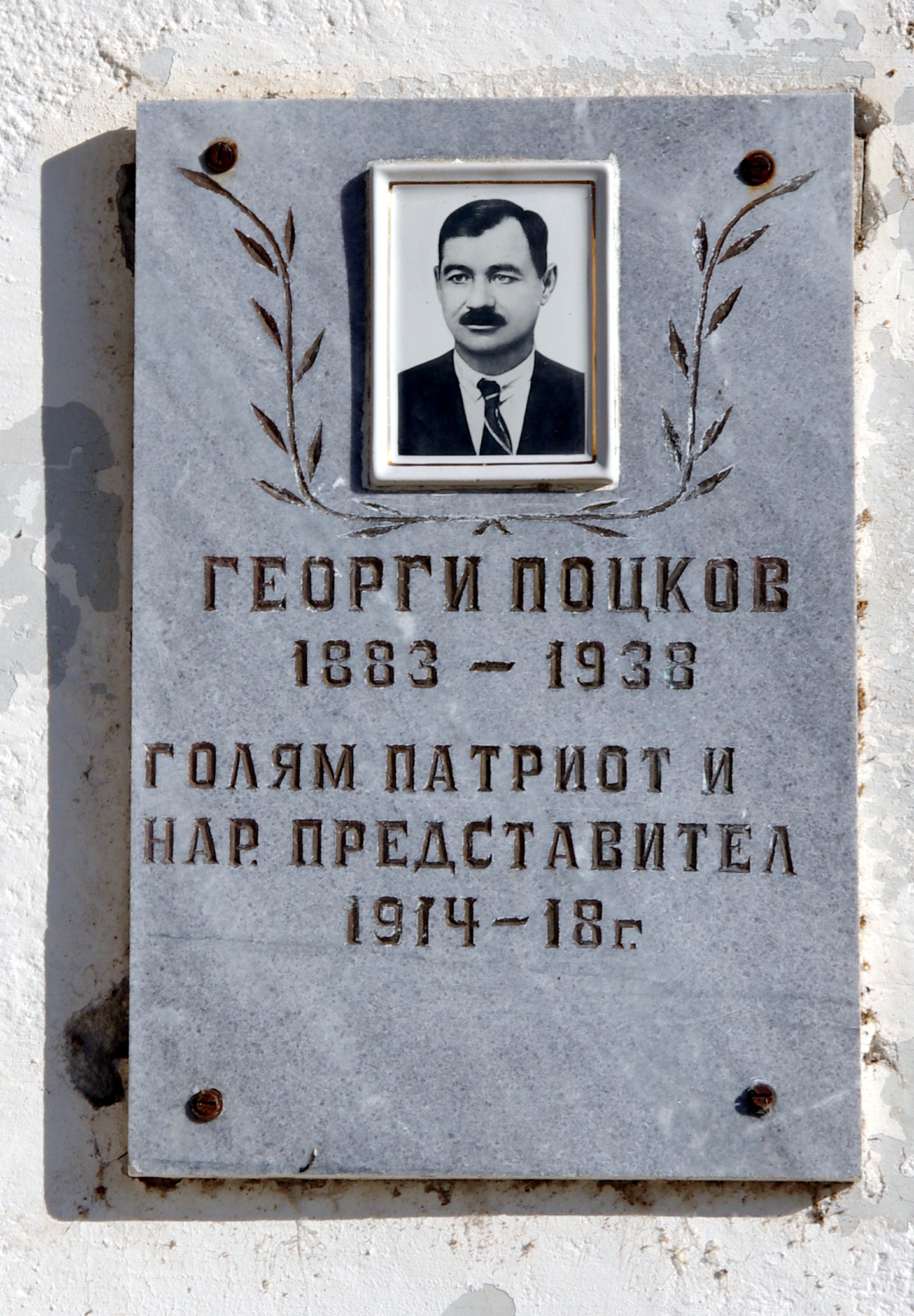 Паметна плоча на Георги Поцков на кметството в село Враня